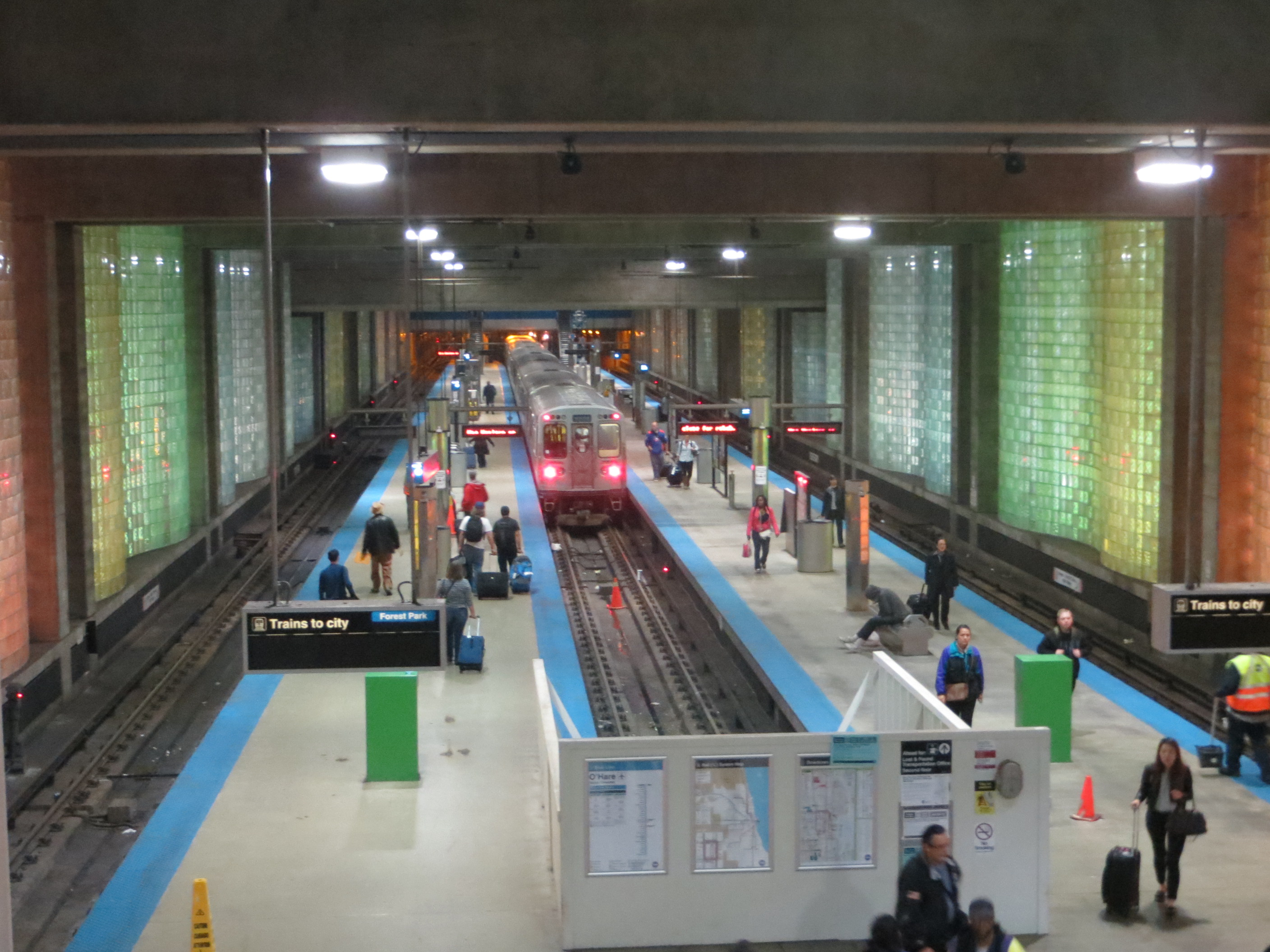 20141007 03 CTA Blue Line L @ O'Hare